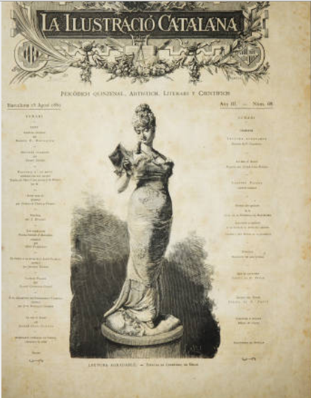 La Ilustració Catalana, número 068 15 Agost de 1882 pàg. 225